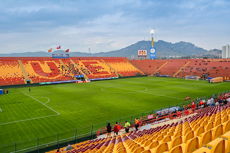 Unión Española - Everton, 06-09-2015, Estadio Santa Laura, Santiago, Chile